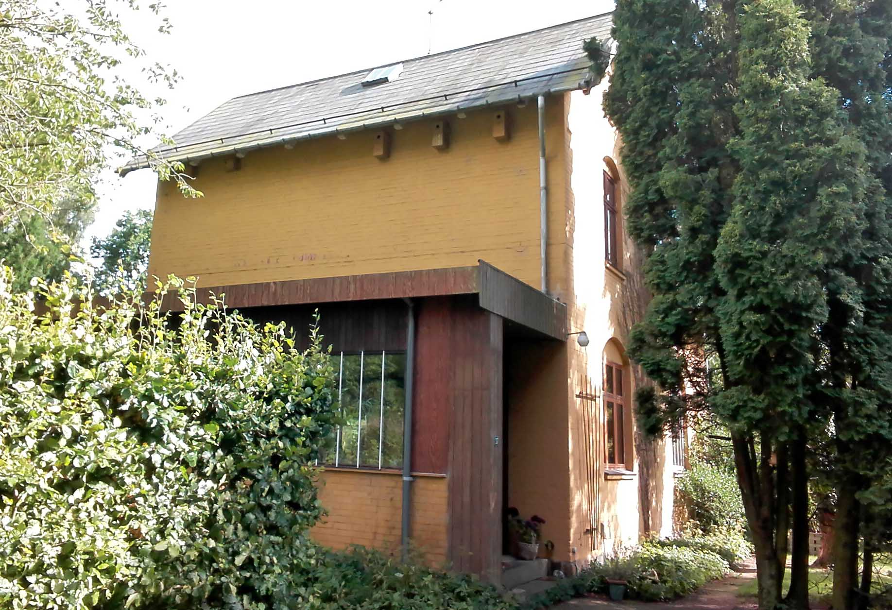 Rygård Station i Langå (Nyborg Kommune) fra nord